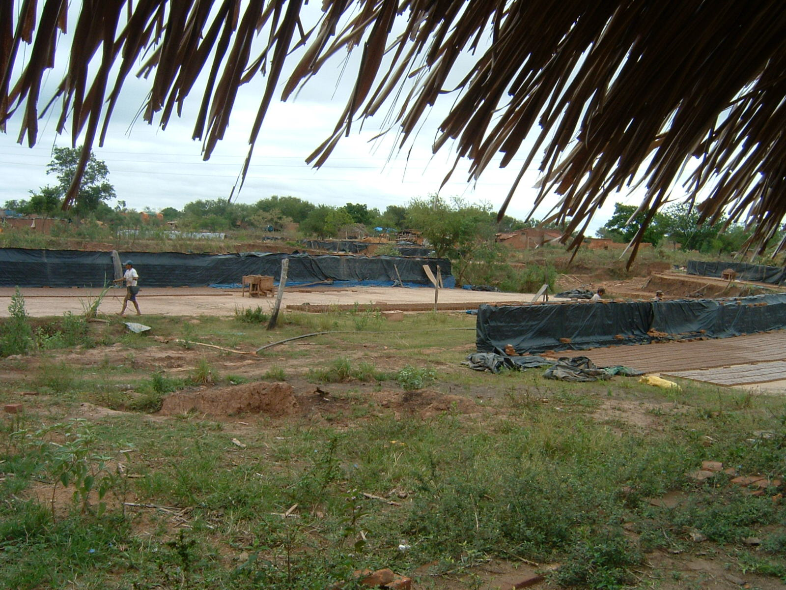 Foto scattata da me La costruzione dei mattoni nei dintorni di Montero (Bolivia)